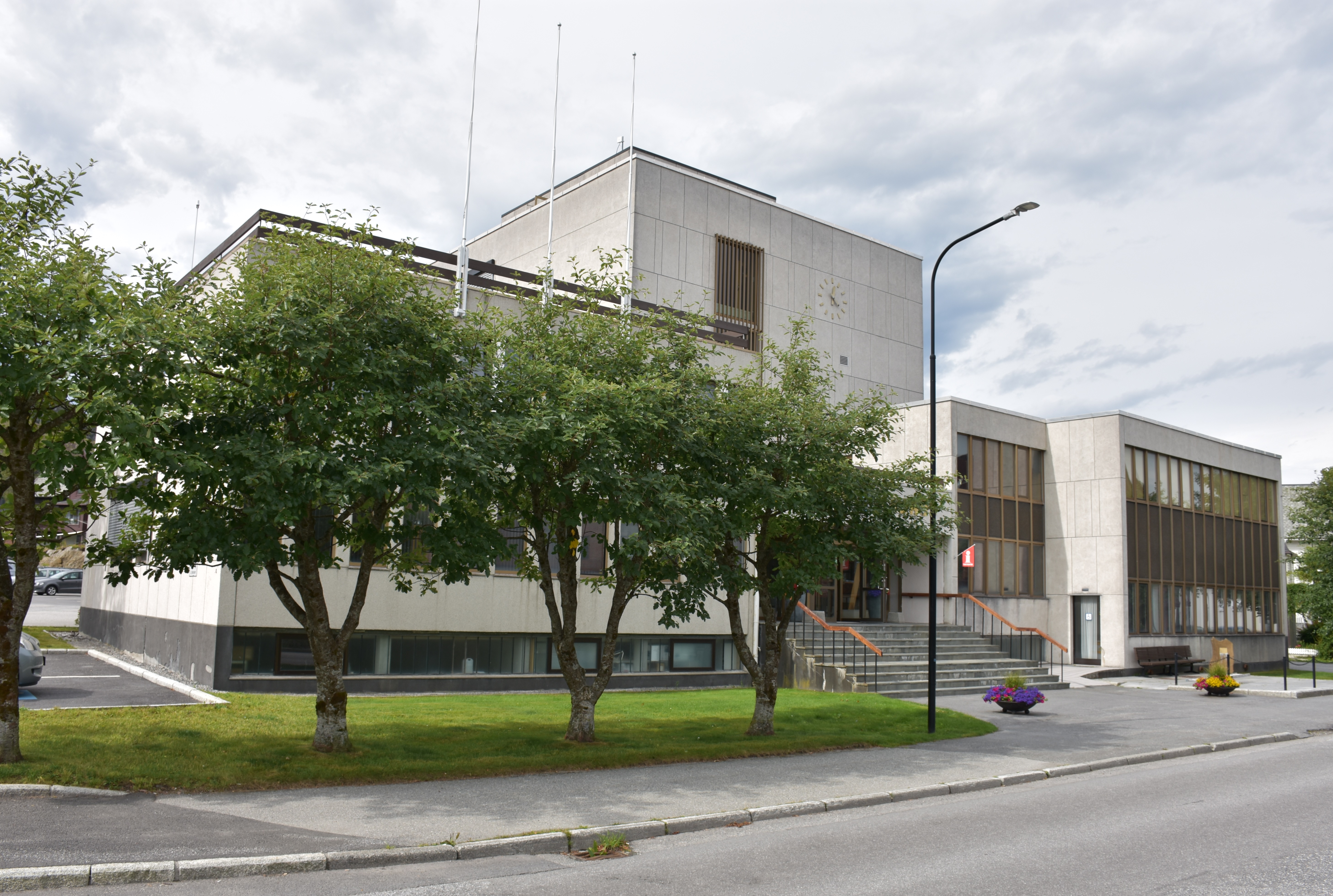 Herøy rådhus, Fosnavåg